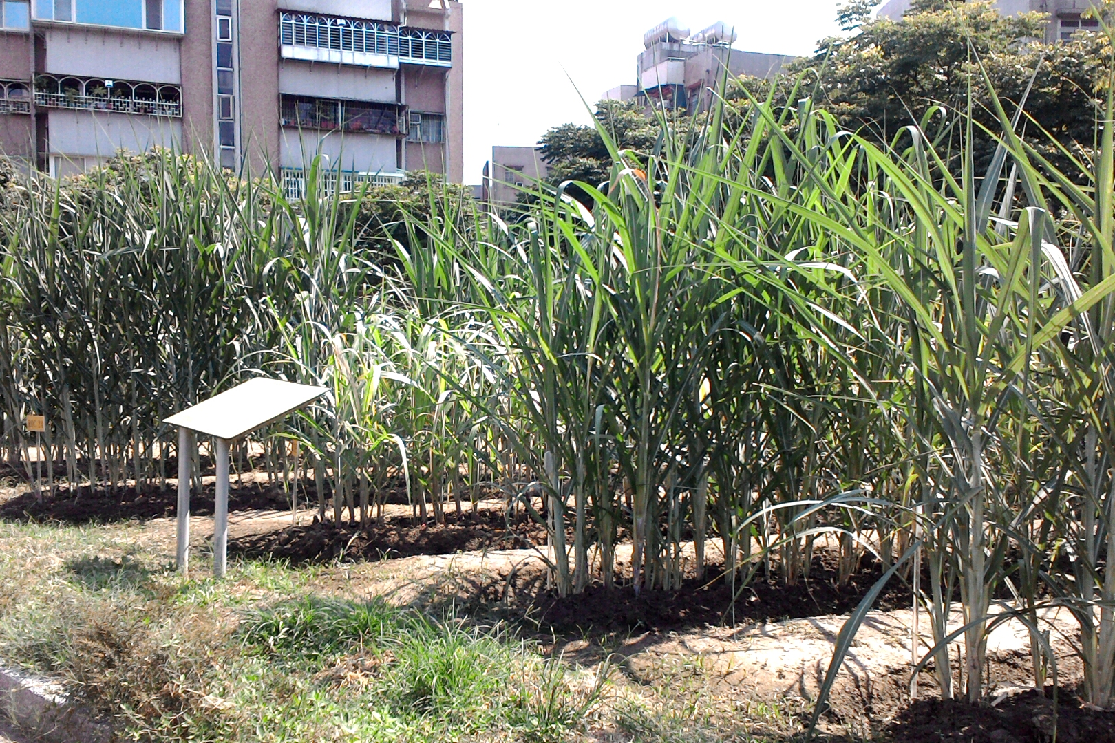 糖廍文化園區甘蔗園,台北市萬華區大理次分區糖廍里